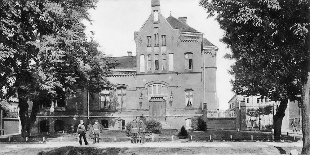 Offizier-Kasino des Holsteinischen Feld-Artillerie-Regiments Nr. 24 in Güstrow.